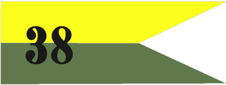 Proporczyk na beret 38 dzab OP